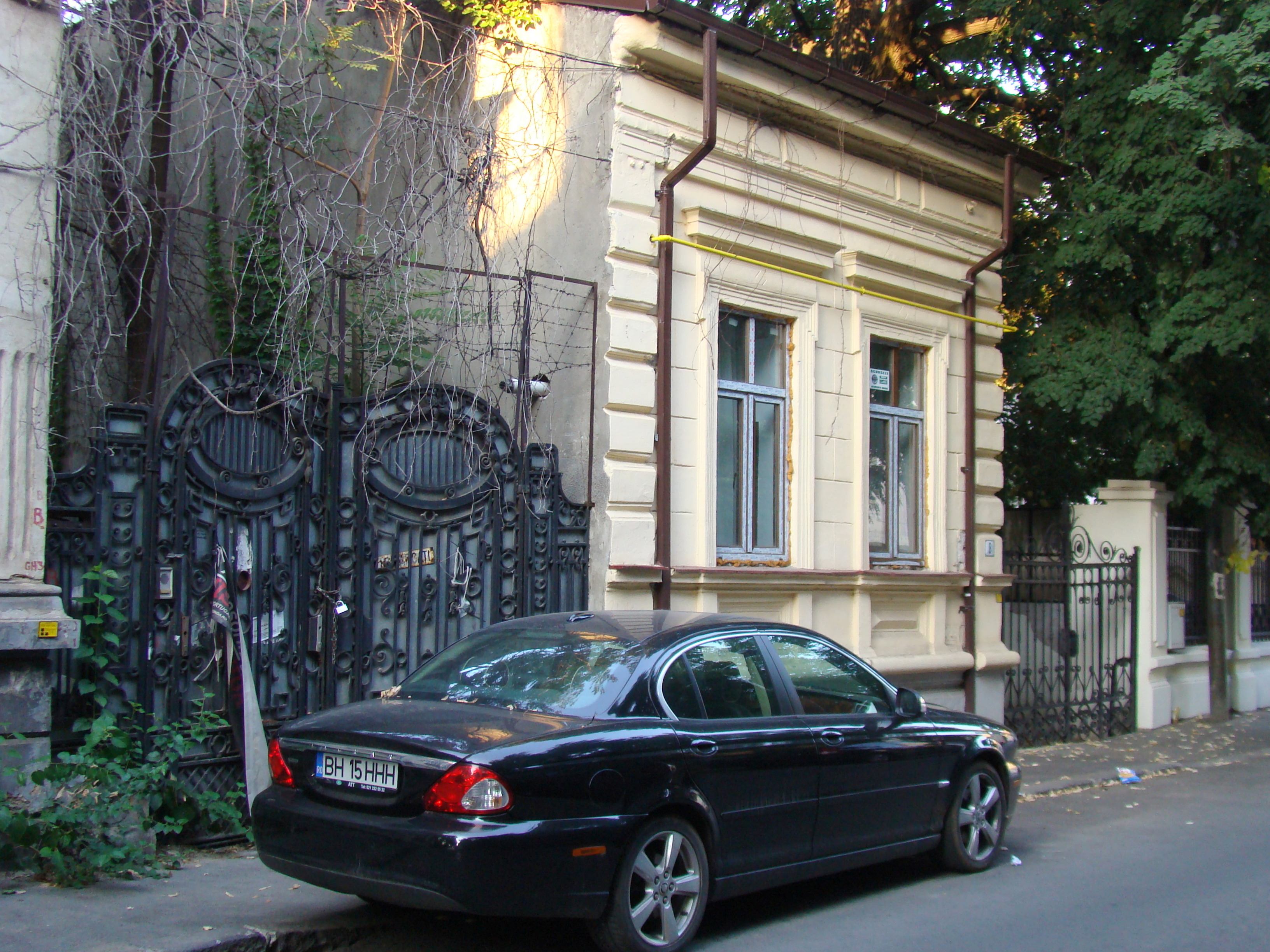 Casă monument istoric, str. Theodor Aman, nr.8